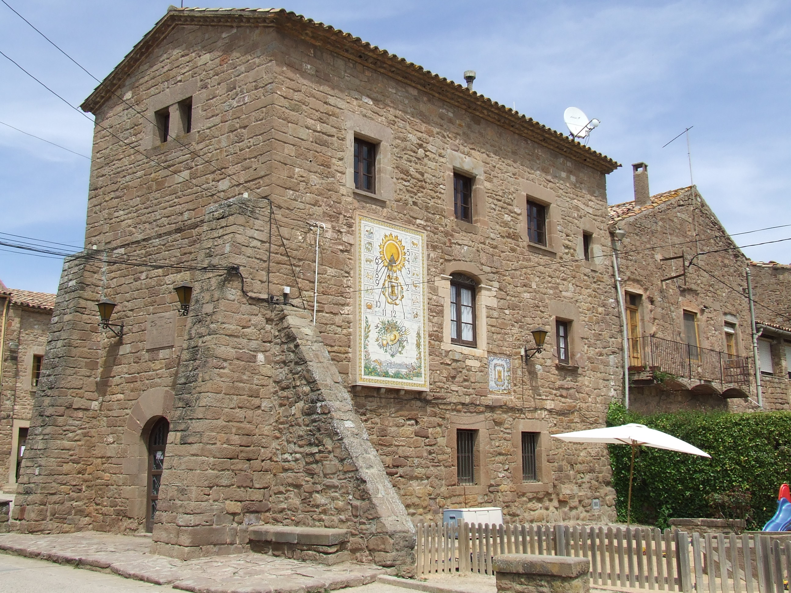 La Casa de la Vila de l'Estany (Moianès)